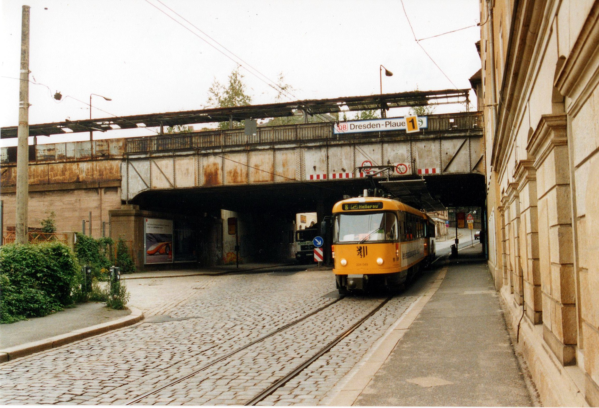 Doppeltraktion von Tatrawagen vom Typ T4D MT auf dem eingleisigen Abschnitt Altplauen - Reckestraße in Richtung Hellerau, mit Triebwagen 224 209 an der Spitze.